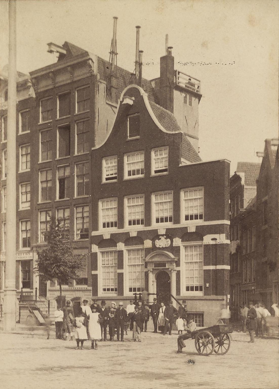 Amsterdam: Makelaarskantoor. Foto. Afmetingen onbekend. Rijksdienst voor de Monumentenzorg (OF-05186).